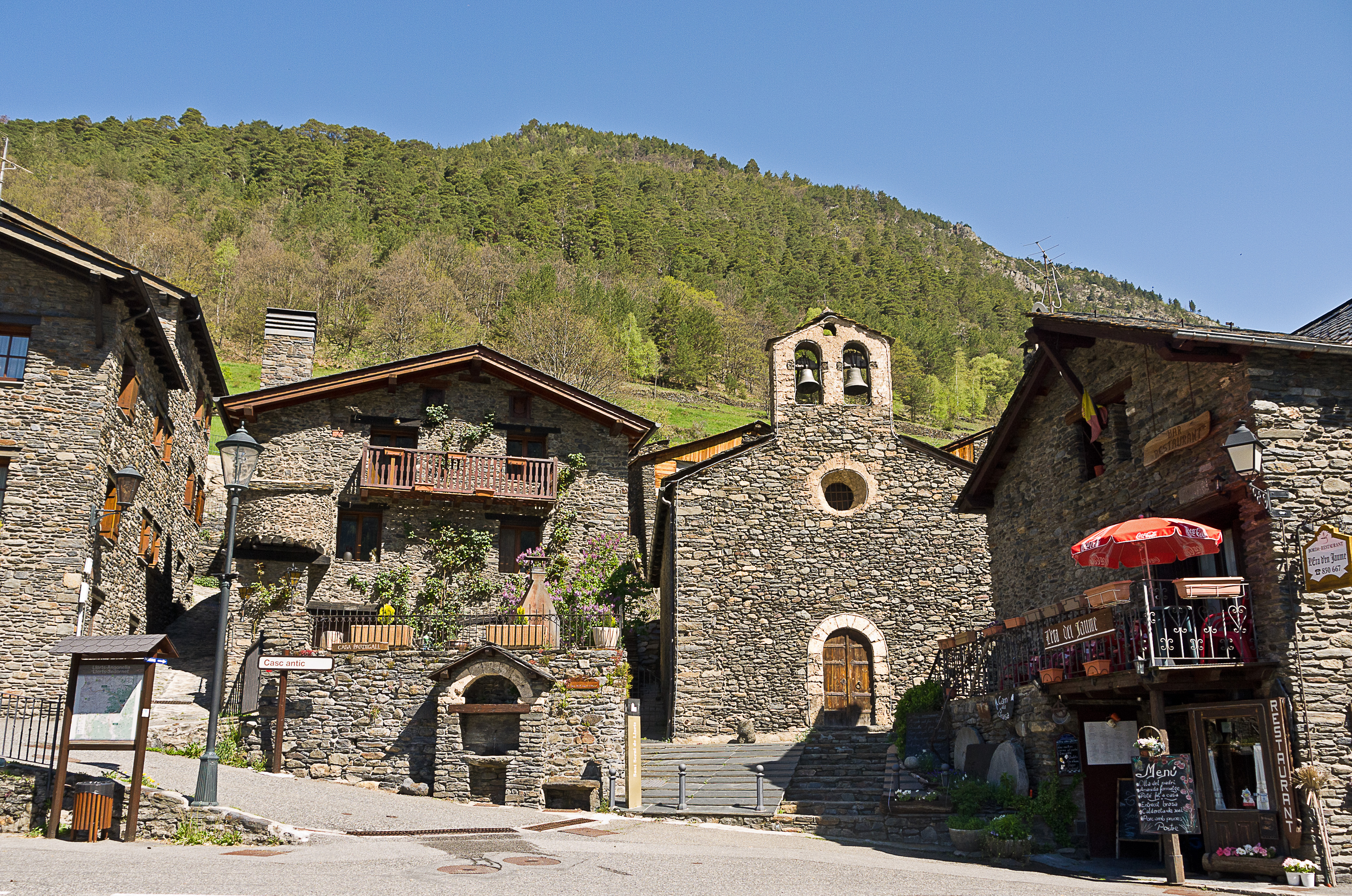 Andorre - Oridno - Llorts